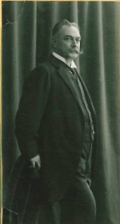 Richard Schaeuffelen (*18. Dezember 1829 in Heilbronn; † 29. Dezember 1882) Lebensdaten des Richard Schaeuffelen, Papierfabrikant im Gedenkblatt zum 25jährigen Firmenjubiläum von Richard Schaeuffelen , 1906